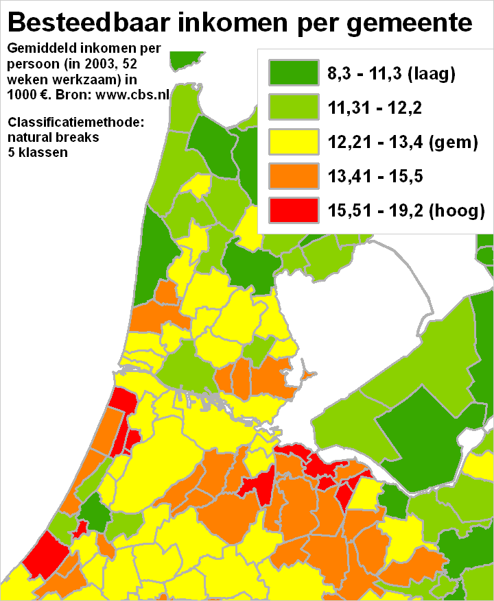 Besteedbaar inkomen, classificatie o.b.v. natural breaks. Bron data (besteedbaar inkomen) van